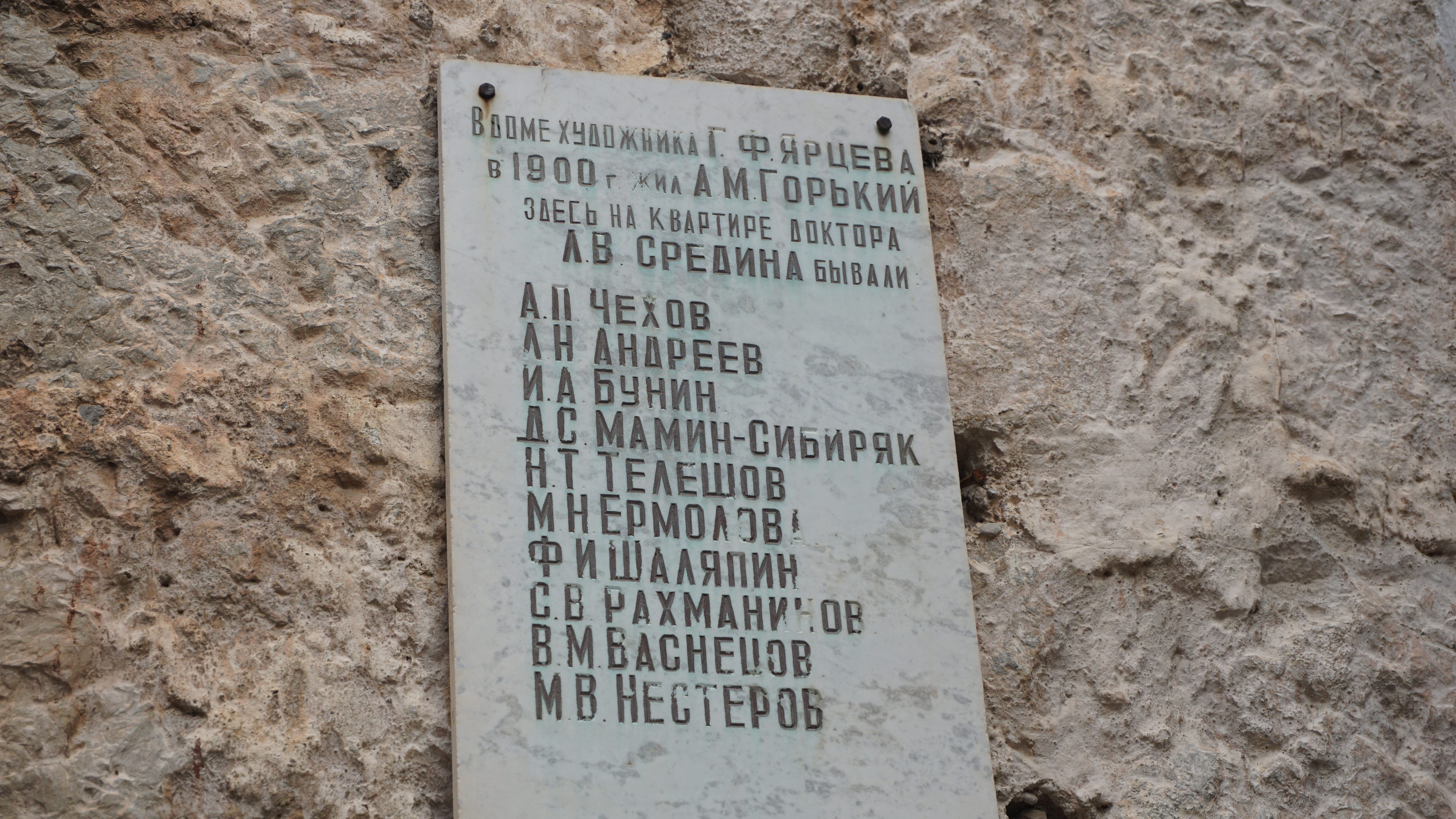 Дом, в котором жил А.М.Горький, где бывали А.П.Чехов, И.А.Бунин, Л.Н.Андреев, М.Н.Ермолова, Ф.И.Шаляпин, С.В.Рахманинов, В.М.Васнецов, М.Н.Нестеров: улица Войкова, 9, Ялта, Крым This object is located on the Crimean Peninsula and recognized as cultural heritage by Russia under the monument ID: 8231512000. The legal status of the Crimean region is currently disputed.